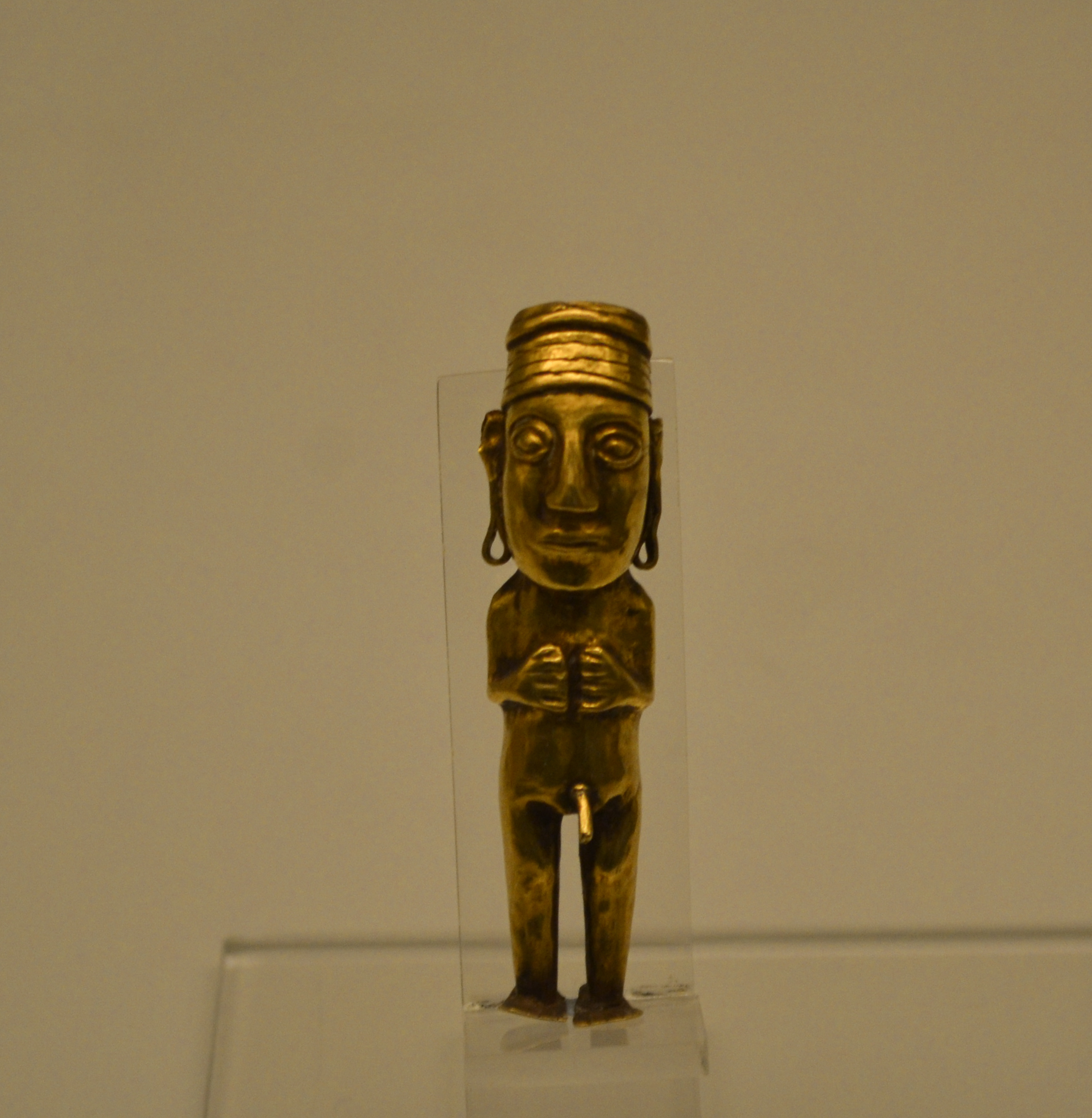 Figurilla de oro inca representando a un hombre. (1400-1533 d. C.). Cultura Inca, Horizonte Tardío. Cuzco, Perú.Nº inv. 7.460. Museo de América.